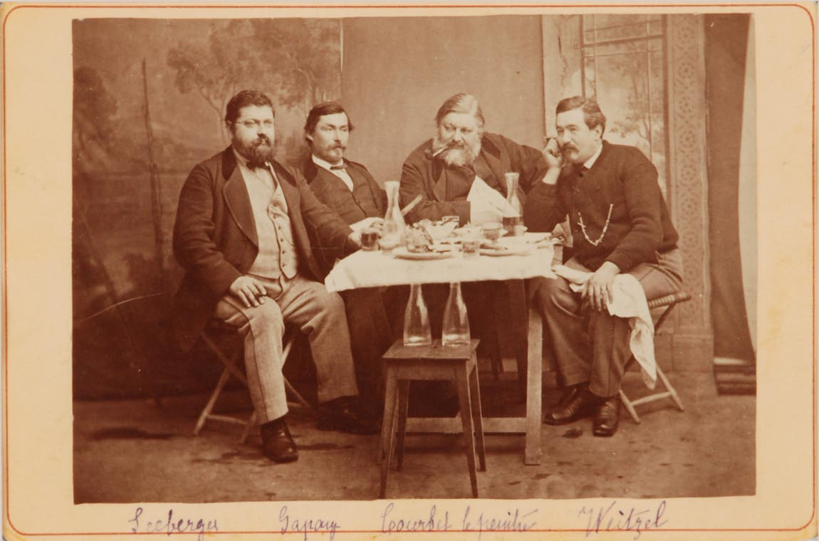 Le peintre est attablé avec ses amis, probablement à Bulle en 1876